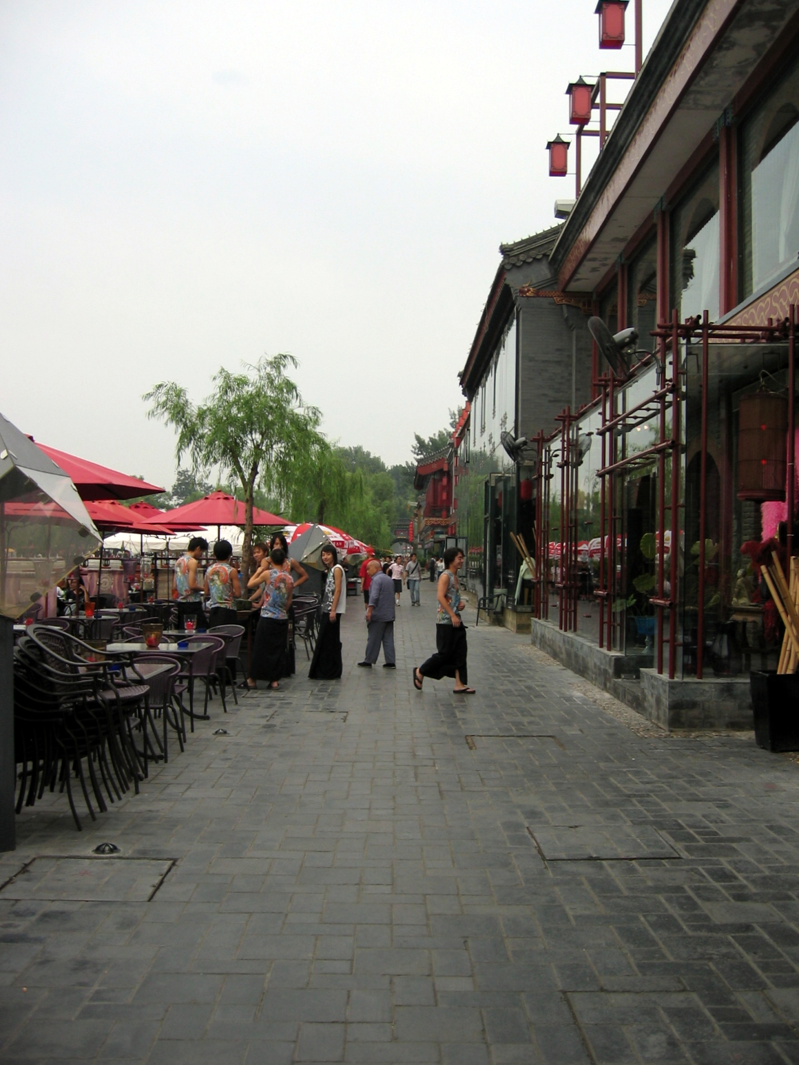 Shichahai 什剎海酒吧區 (2004)